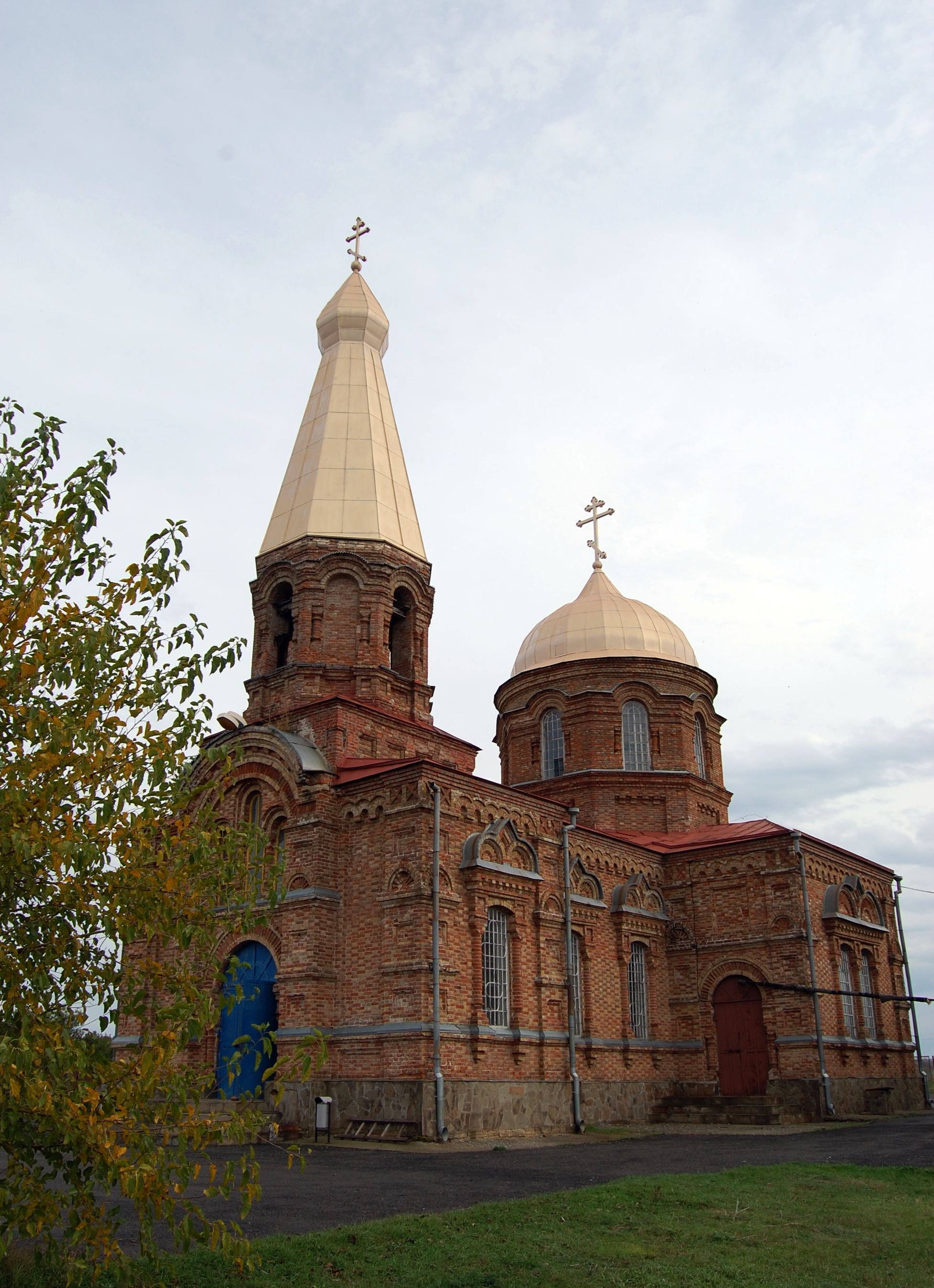 Церковь Рождества Пресвятой Богородицы, хутор Крюково Куйбышевского района Ростовской обл., Россия